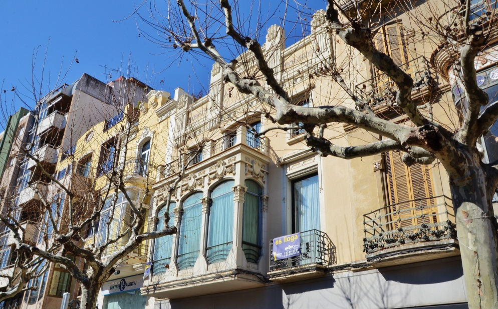 Casa Cañas i Mañé (Vilafranca del Penedès)